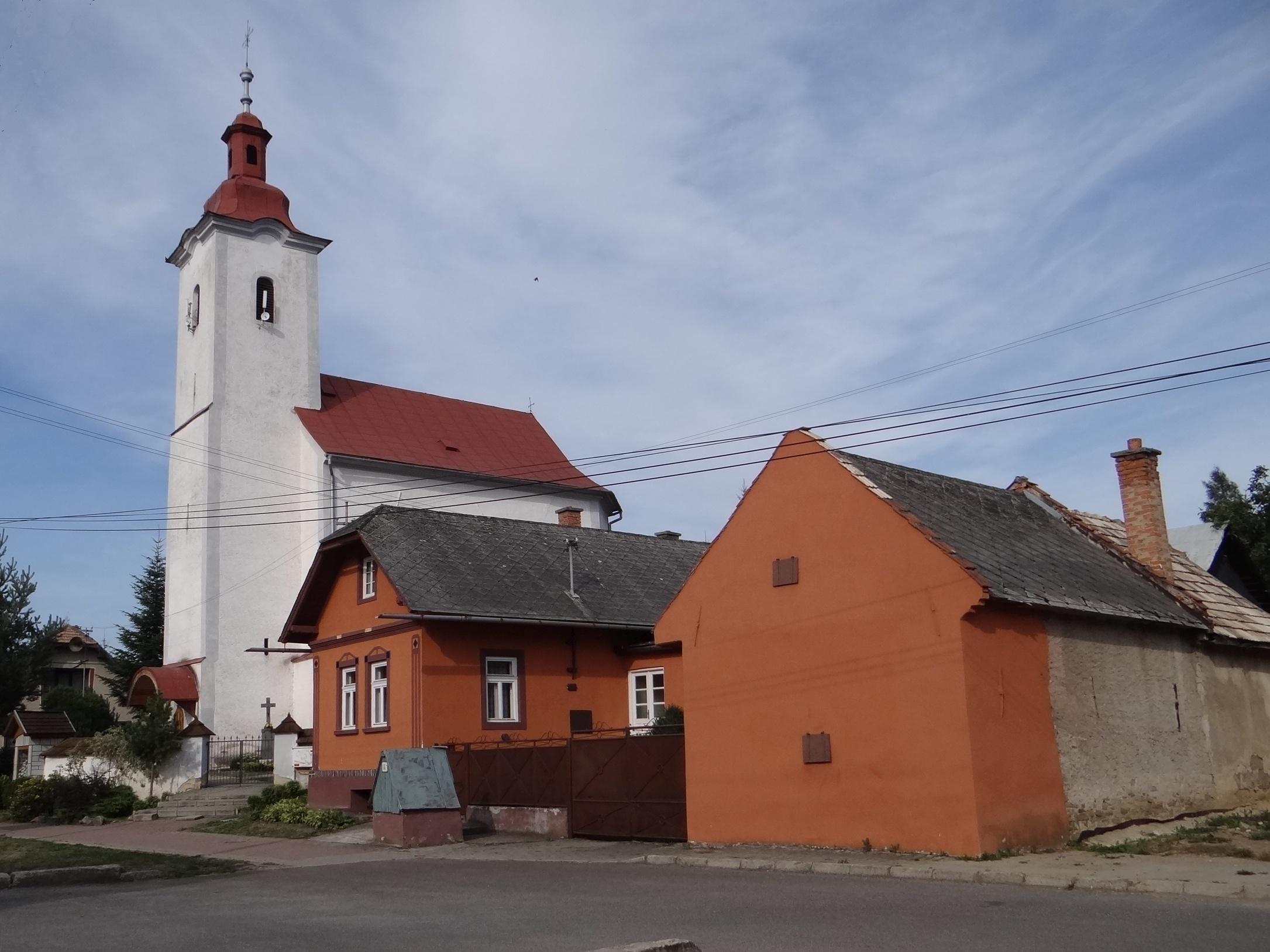 Arnutovce